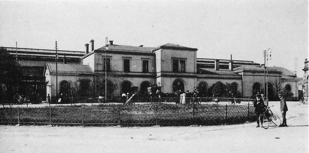 L'ancienne gare de Sarrebourg, Moselle, France, désaffectée en 1923 et démolie en 1938.